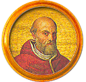 Medallón de la frise des papes de la basílica de San Pablo Extramuros, Roma. Es un retrato sobre mosaico que representa a Marcelo II, es el 222º papa de la Iglesia católica (1555). Enlaza con la serie de medallones que reproducen la figura de todos los Papas de la historia.